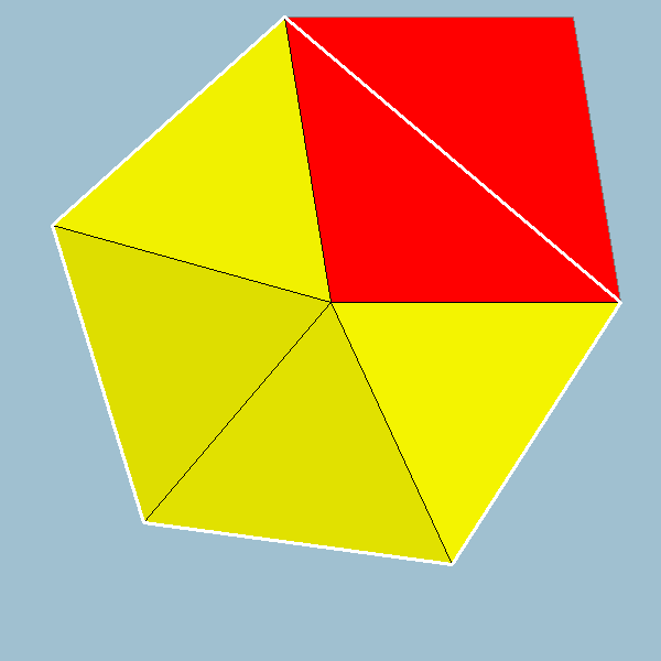 Vertex figure for polyhedron